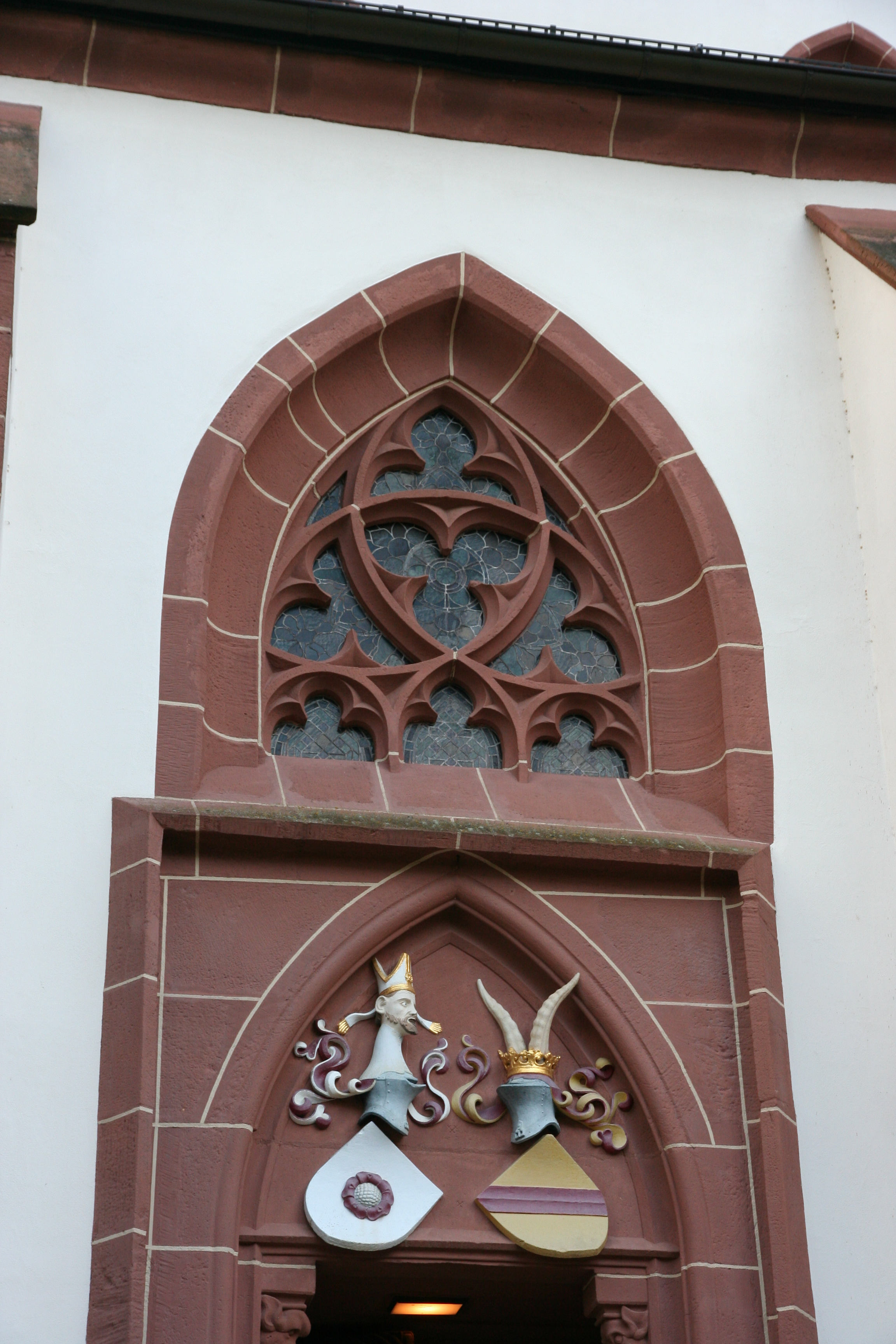 Römisch-katholische Liebfrauenkirche Gernsbach